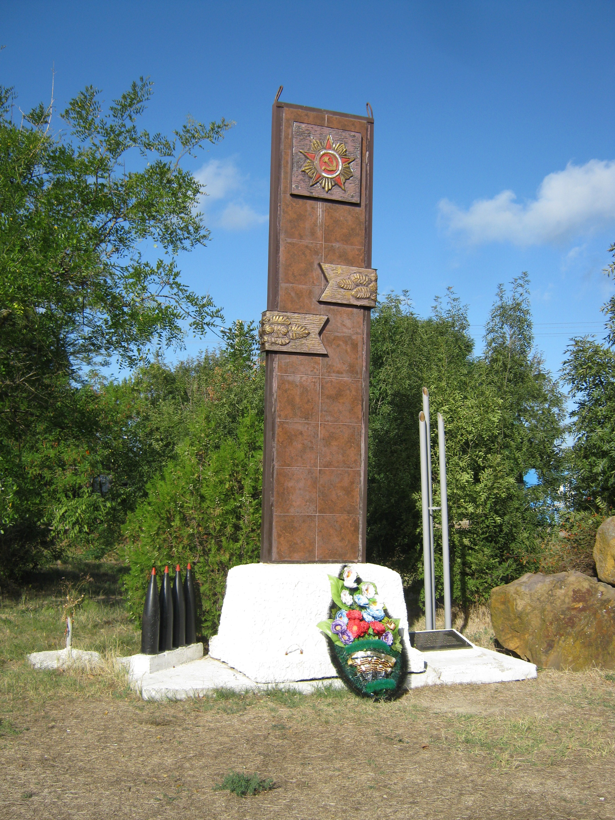 Памятный знак на месте расположения 54-й береговой батареи (Николаевка, Крым) 1